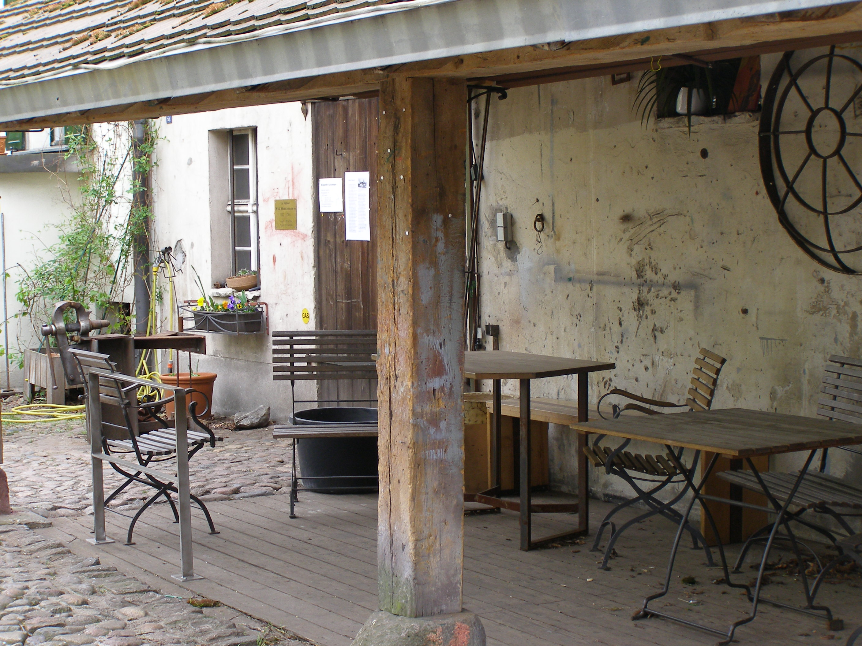 „Böhmisch-Rixdorf“ in Berlin, Rixdorfer Schmiede „Český Rixdorf“ v Berlíně, Rixdorfská kovárna „Bohemian Rixdorf“ in Berlin, Rixdorf smithy